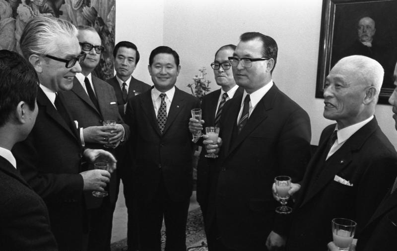 Bundestagspräsident von Hassel empfängt eine Delegation der koreanischen Nationalversammlung (Unter der Leitung von Vizepräsident Chang Kyung Soon)